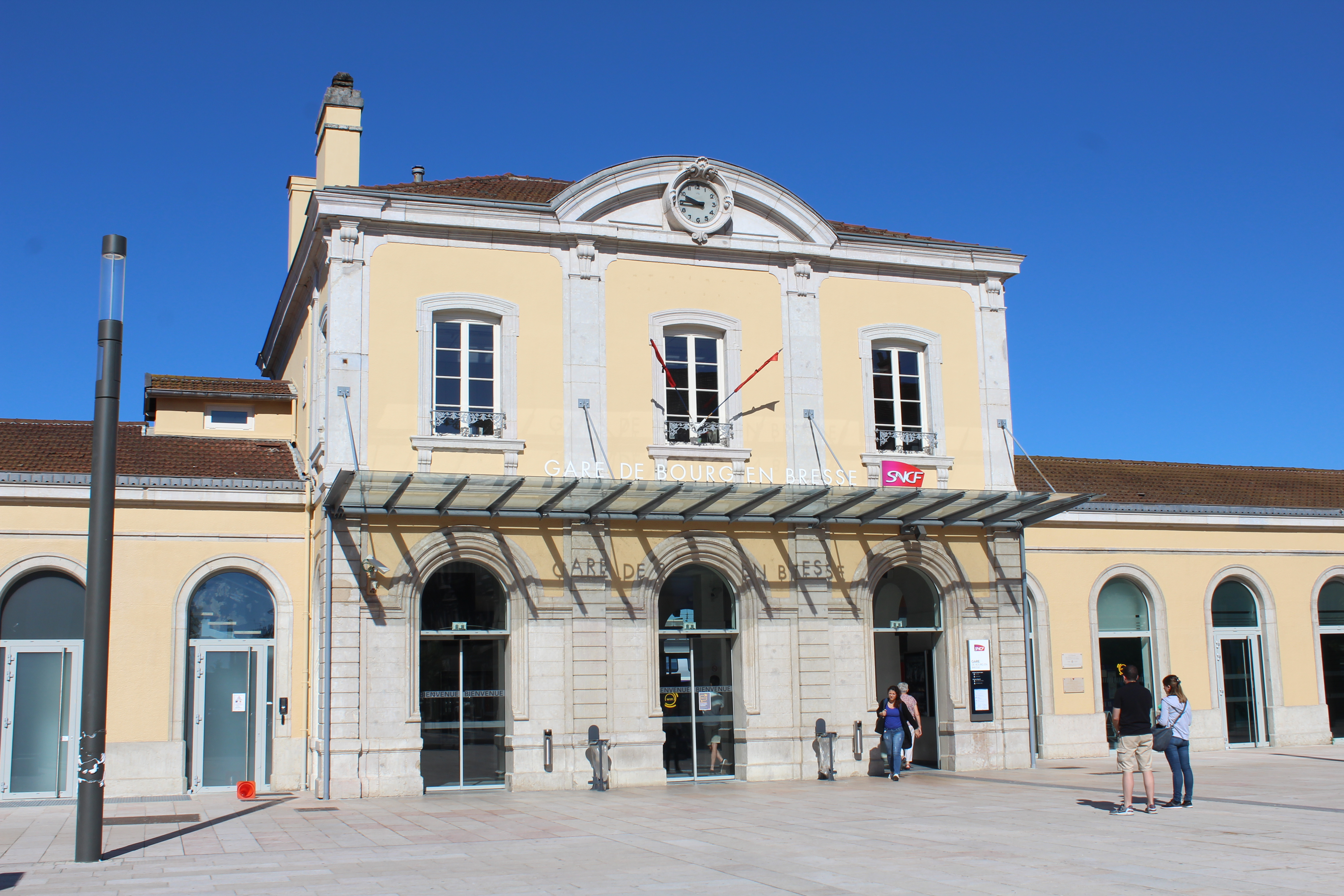 Gare SNCF de Bourg-en-Bresse.